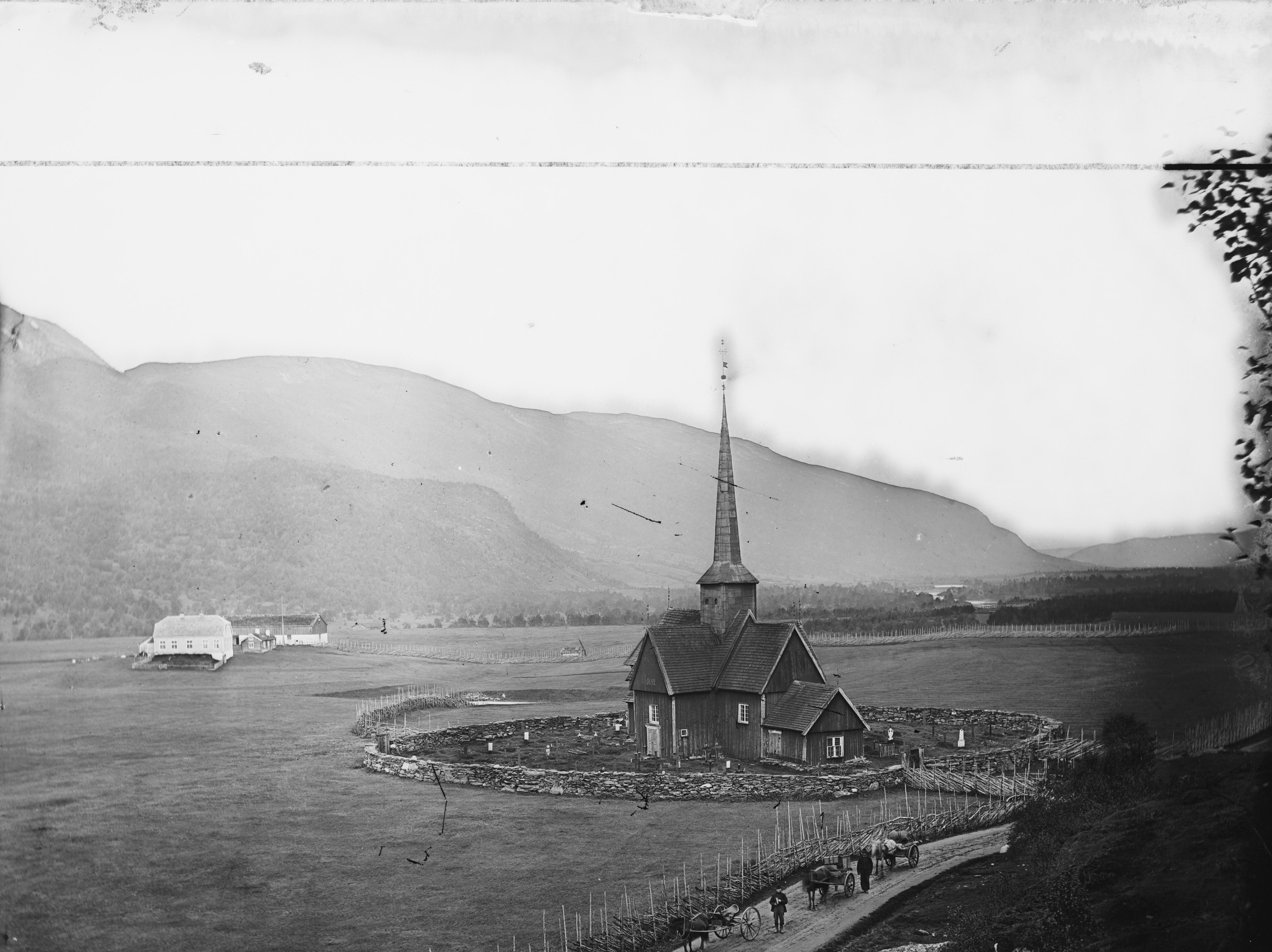 Sted: Kvikne Kommune: Tynset Fylke: Hedmark Tagger